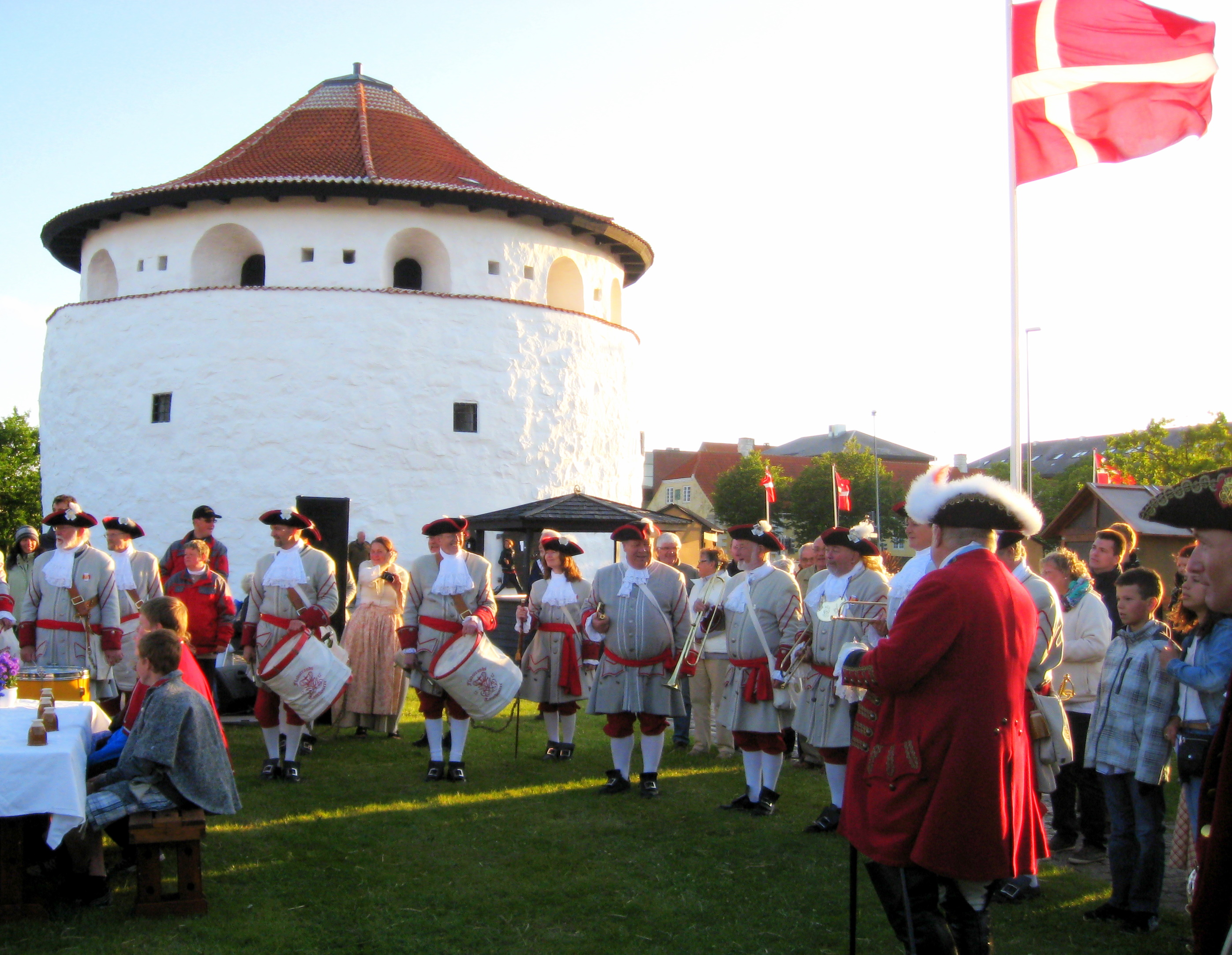 Krudttårnet i Frederikshavn, Tordenskjoldsdage 2011